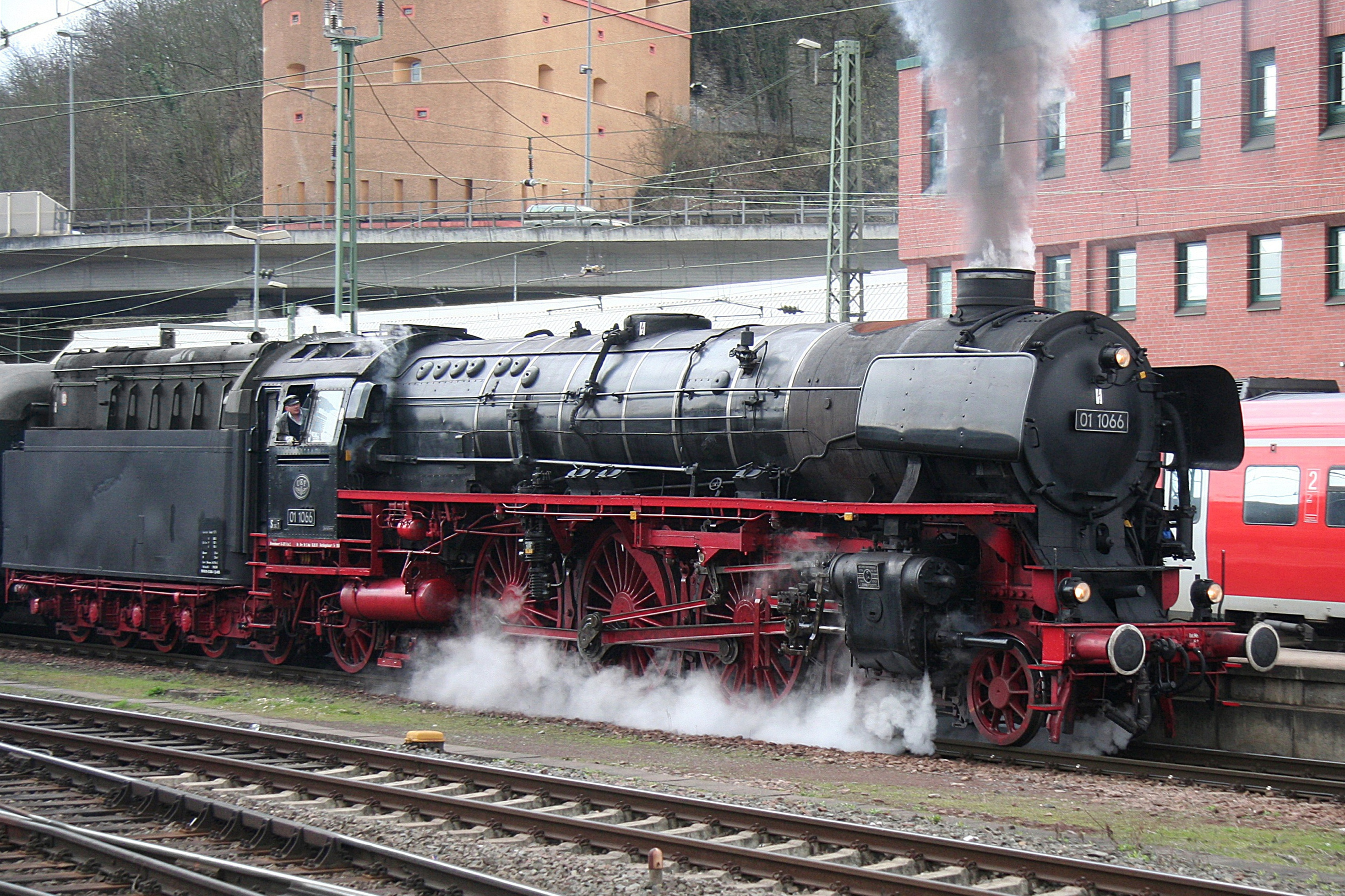 Dampflok 01 1066 in KoblenzHersteller: Berliner Maschinenbau-Actien-Gesellschaft vormals L. Schwartzkopff, Berlin, Baujahr: 1940; Leistung: 2470 Psi, Höchstgeschwindigkeit: 140 km/h; Treibraddurchmesser: 2000 mm, Länge über Puffer: 24.130 mm, Gewicht der dienstbereiten Lok (ohne Tender): 111,6 t